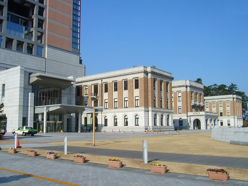 群馬県庁昭和庁舎。